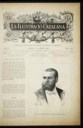 Ilustració Catalana, primera època, número 234 Data: 15 d'Abril de 1890 pàg. 97